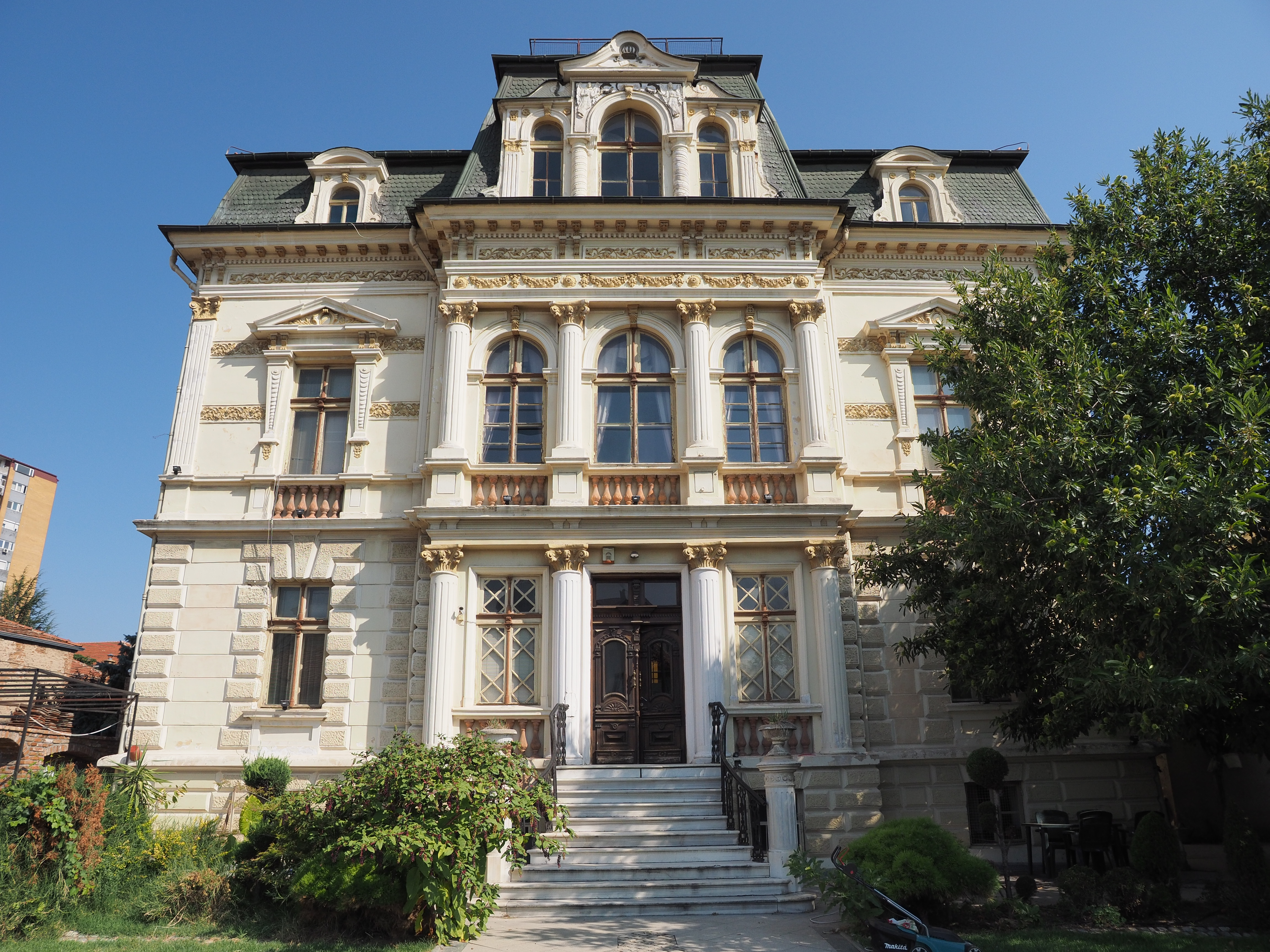 Српски (ћирилица): Седиште Битољске епархије (Српска православна црква) у Битољу, Македонија